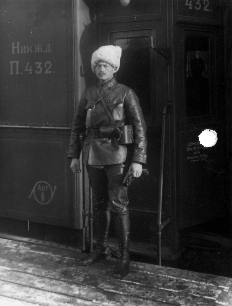 Leon Trotsky's Armored Train